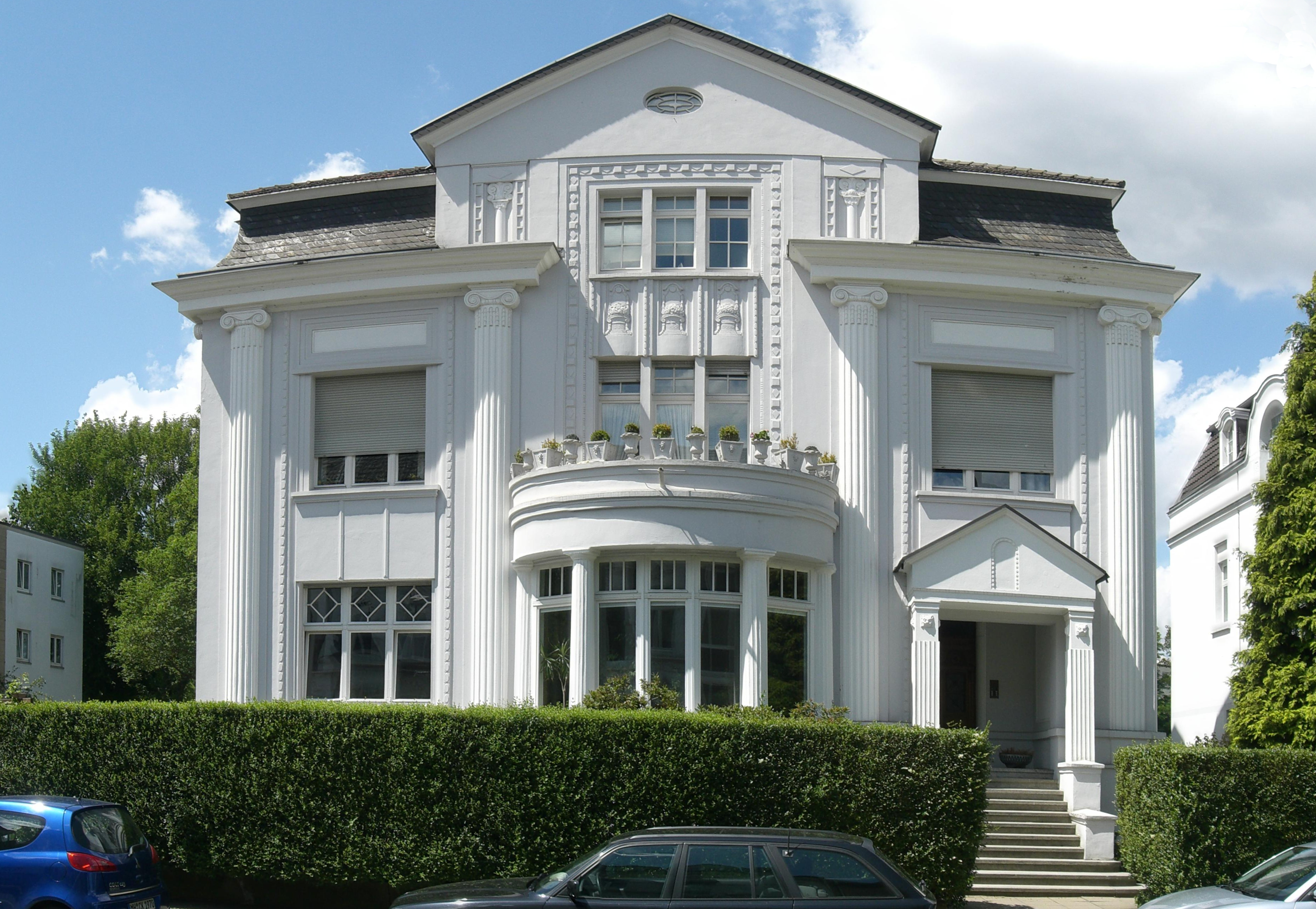 Villa Bagel FStr62